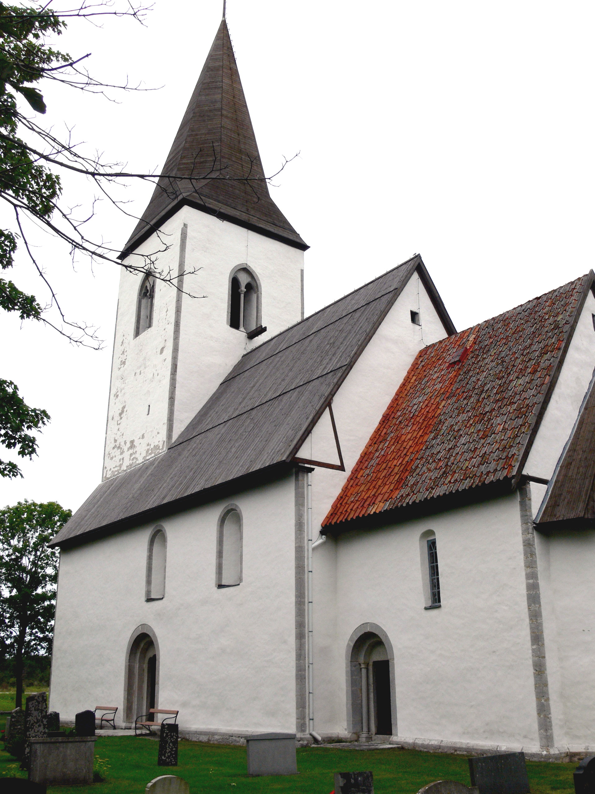 Hejdeby kyrka auf Gotland. Außenansicht